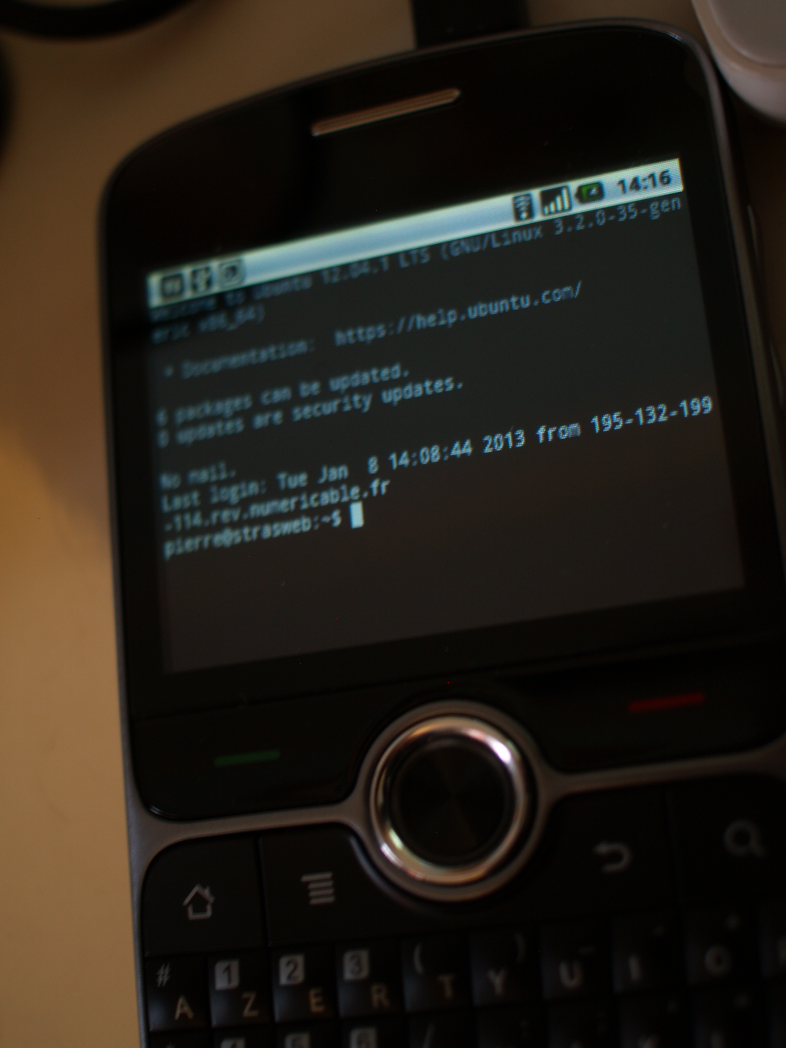 ConnectBot sous Android sur un téléphone Huawei U8350